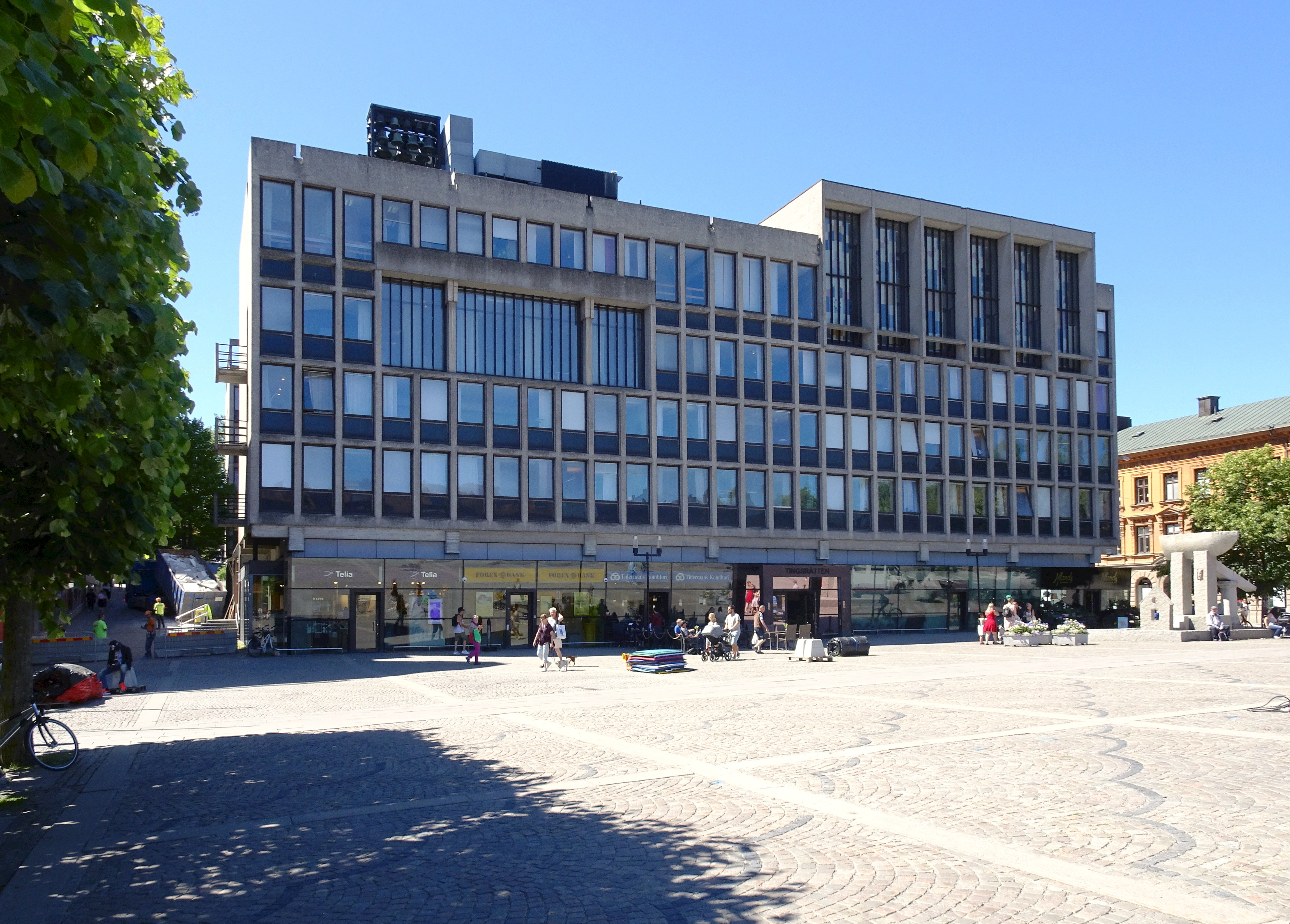 Solen 7, Nya rådhuset, Stora torget, Södertälje. Arkitekt Åke Lindqvist 1965. Även kallat Tingshuset.